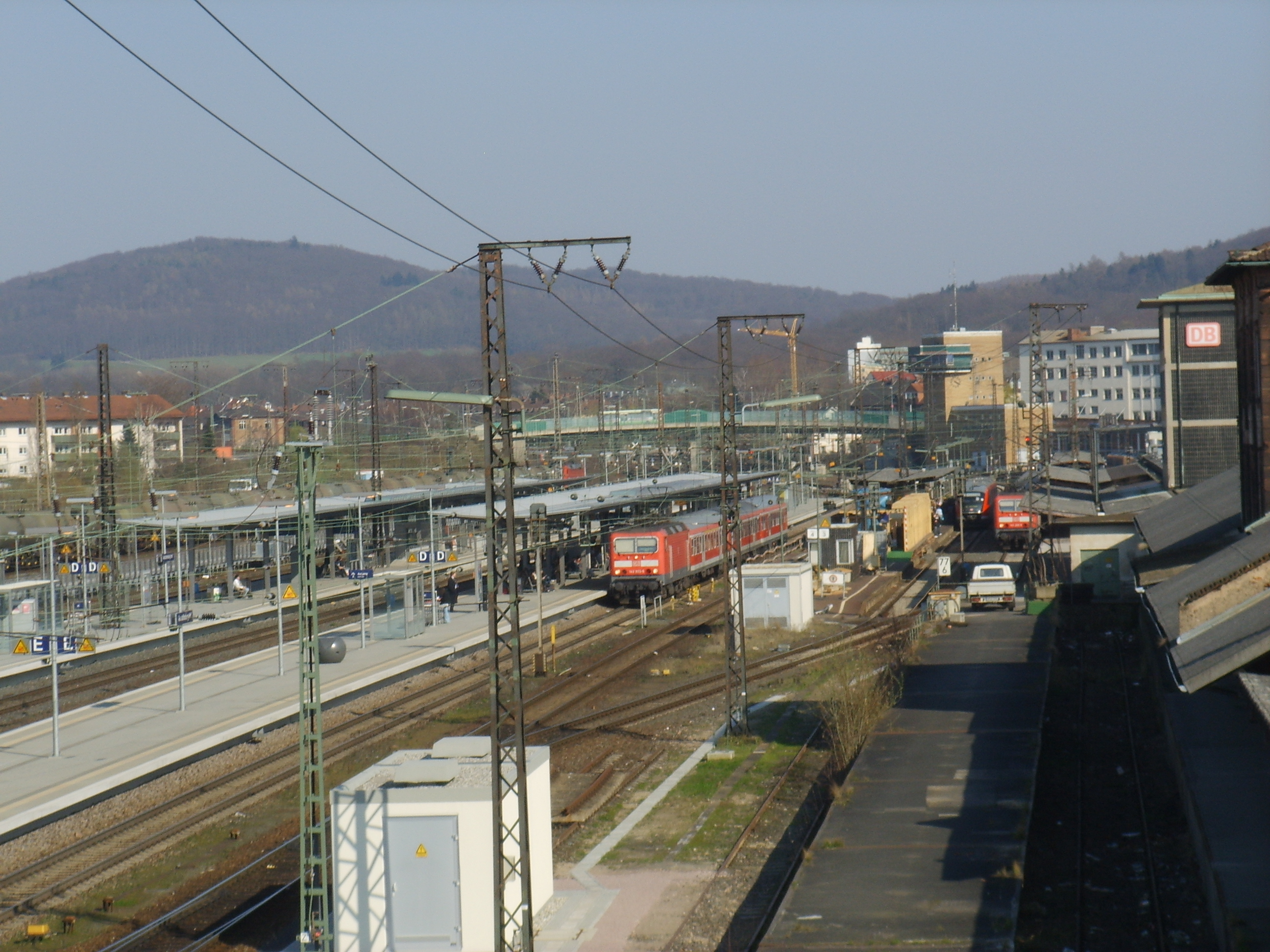 Aschaffenburg Main Station